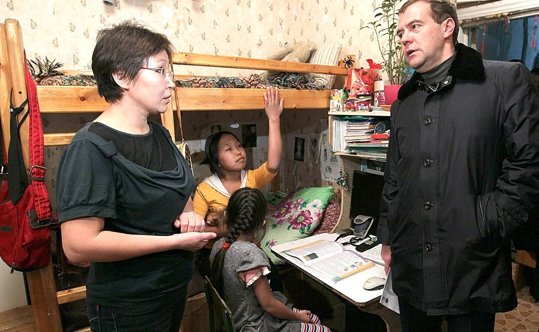 Осмотр квартиры в ветхом жилом доме. Через неделю семья Николаевых переедет в новую квартиру.